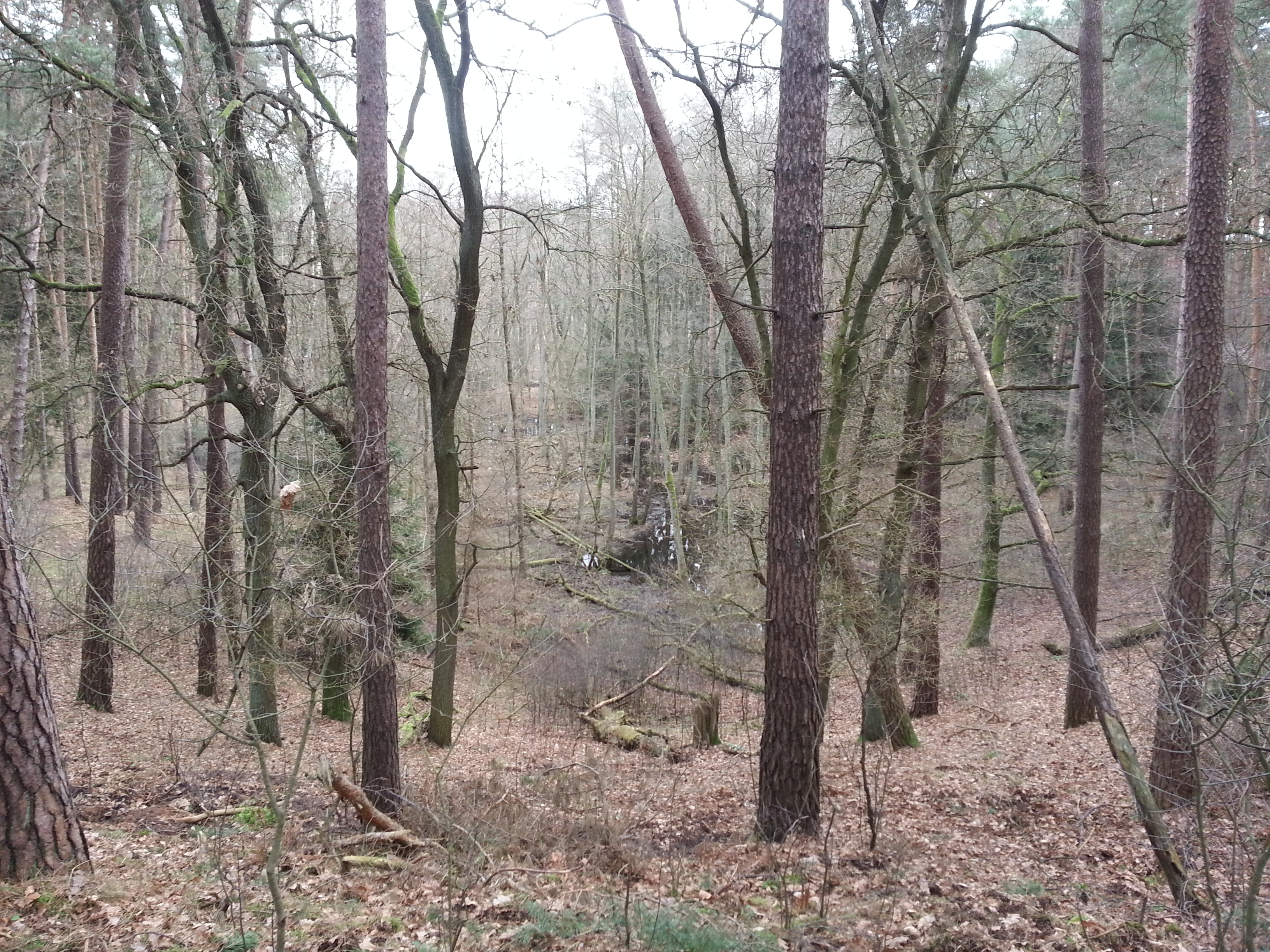 diebesgrund